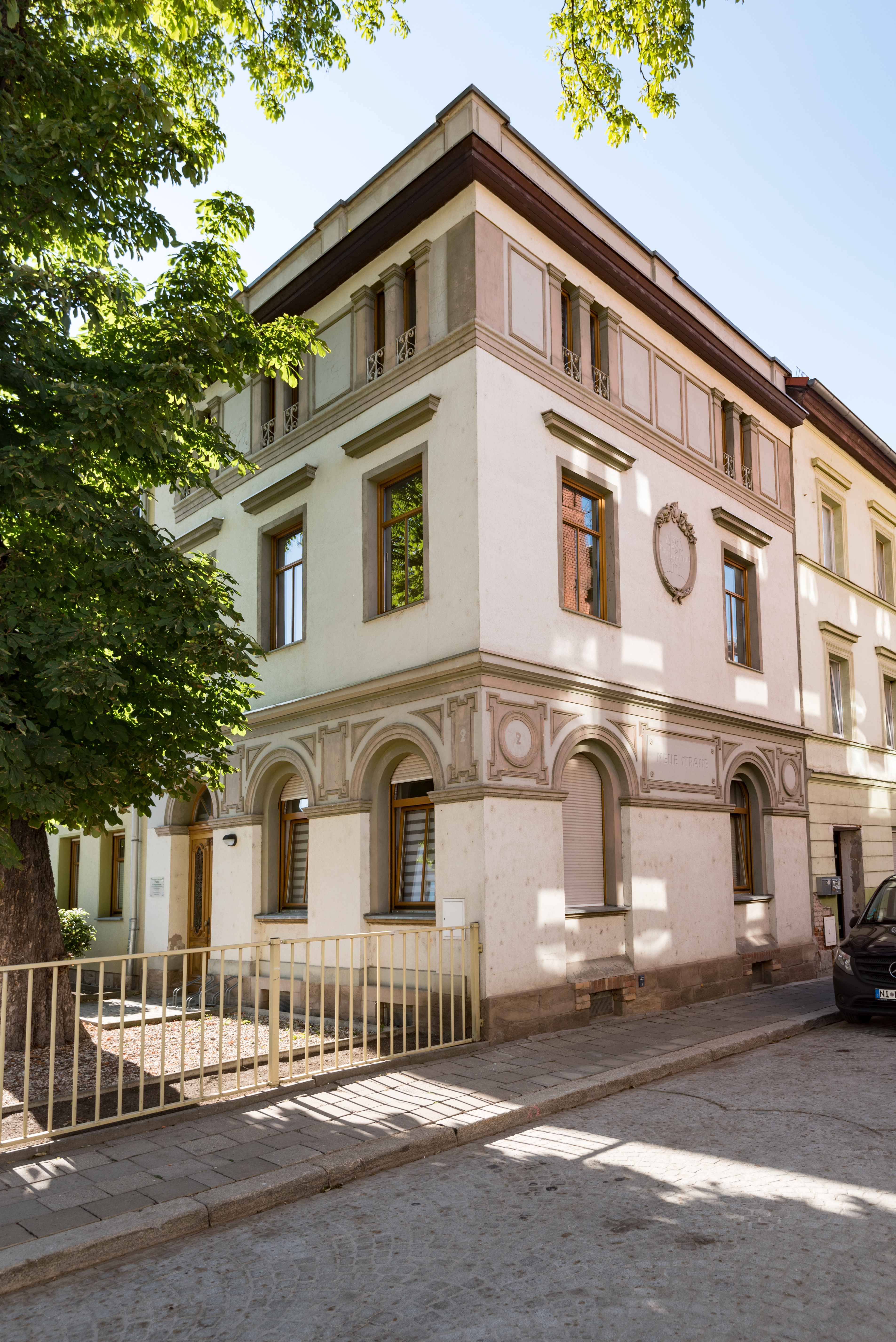 Weißenfels, Neue Straße 2